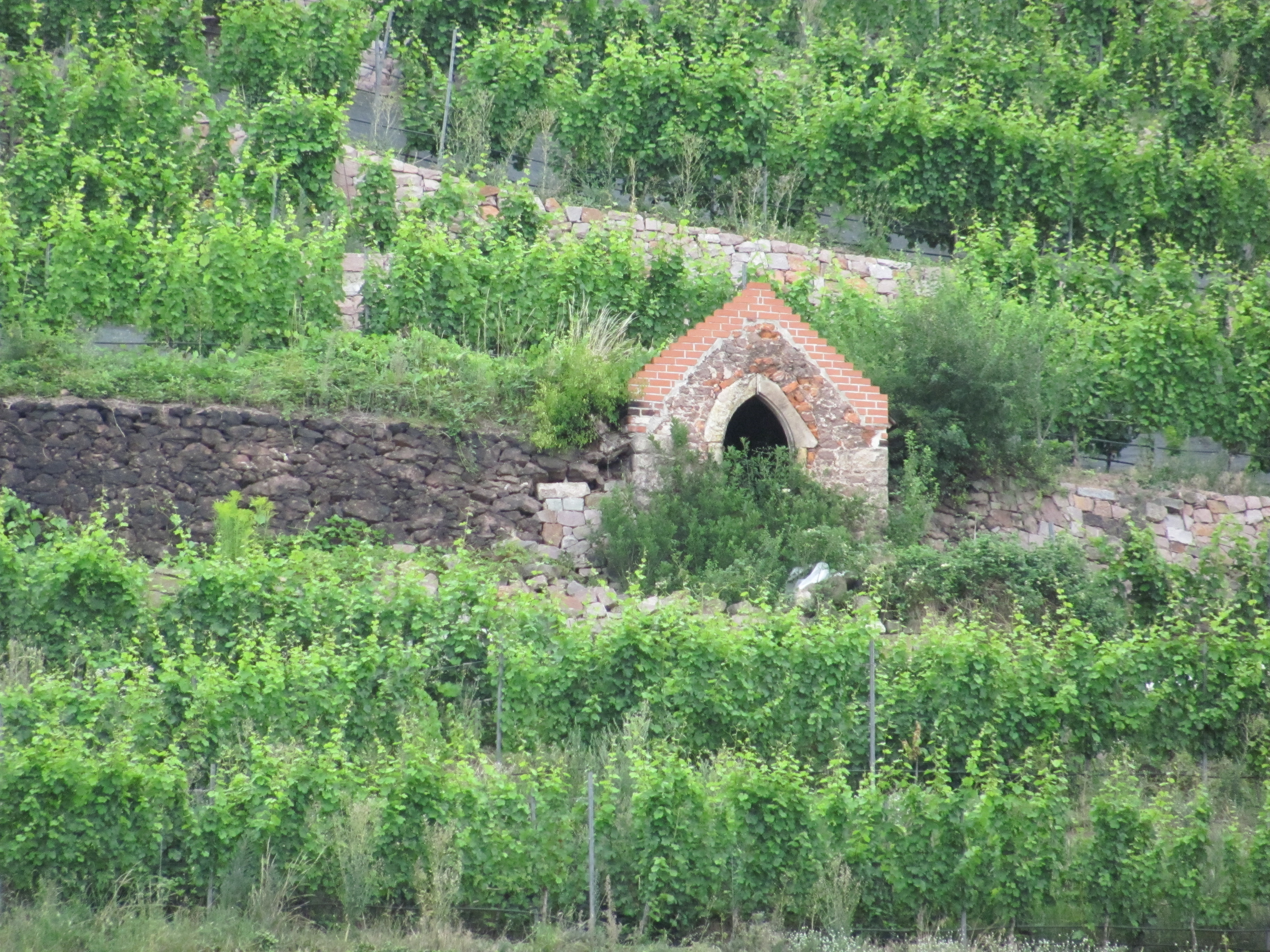 Radebeul Wackerbarth